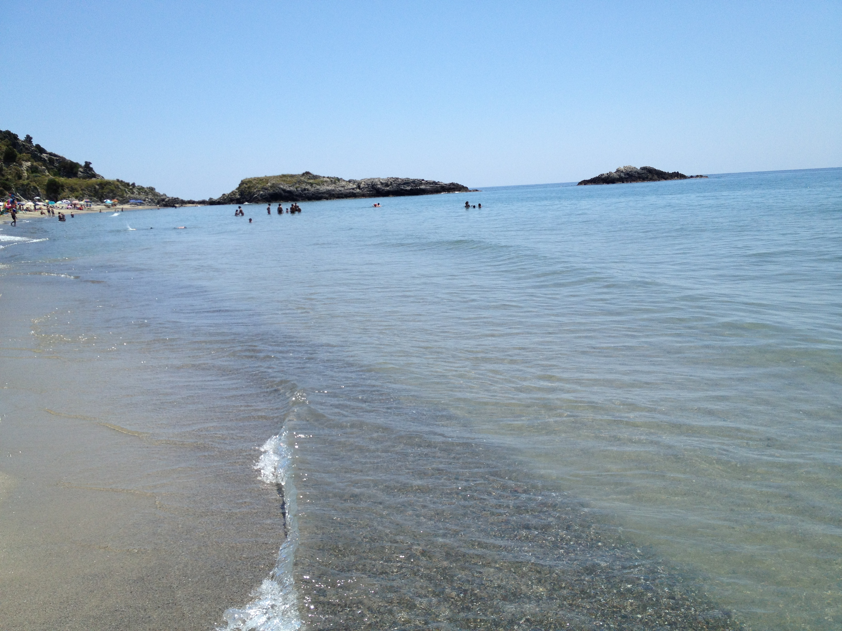 Impressionen vom Strand